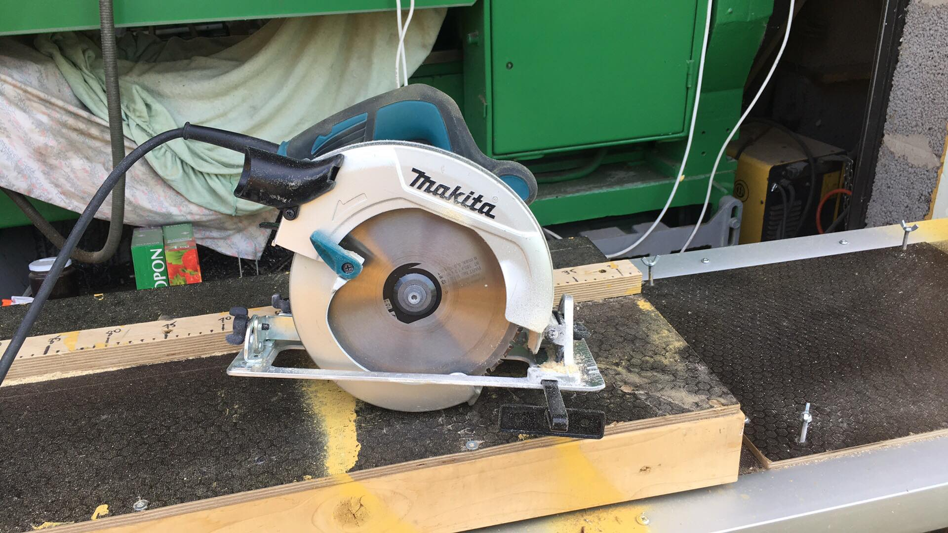 Makita firma poolt valmistatud ketassaag.